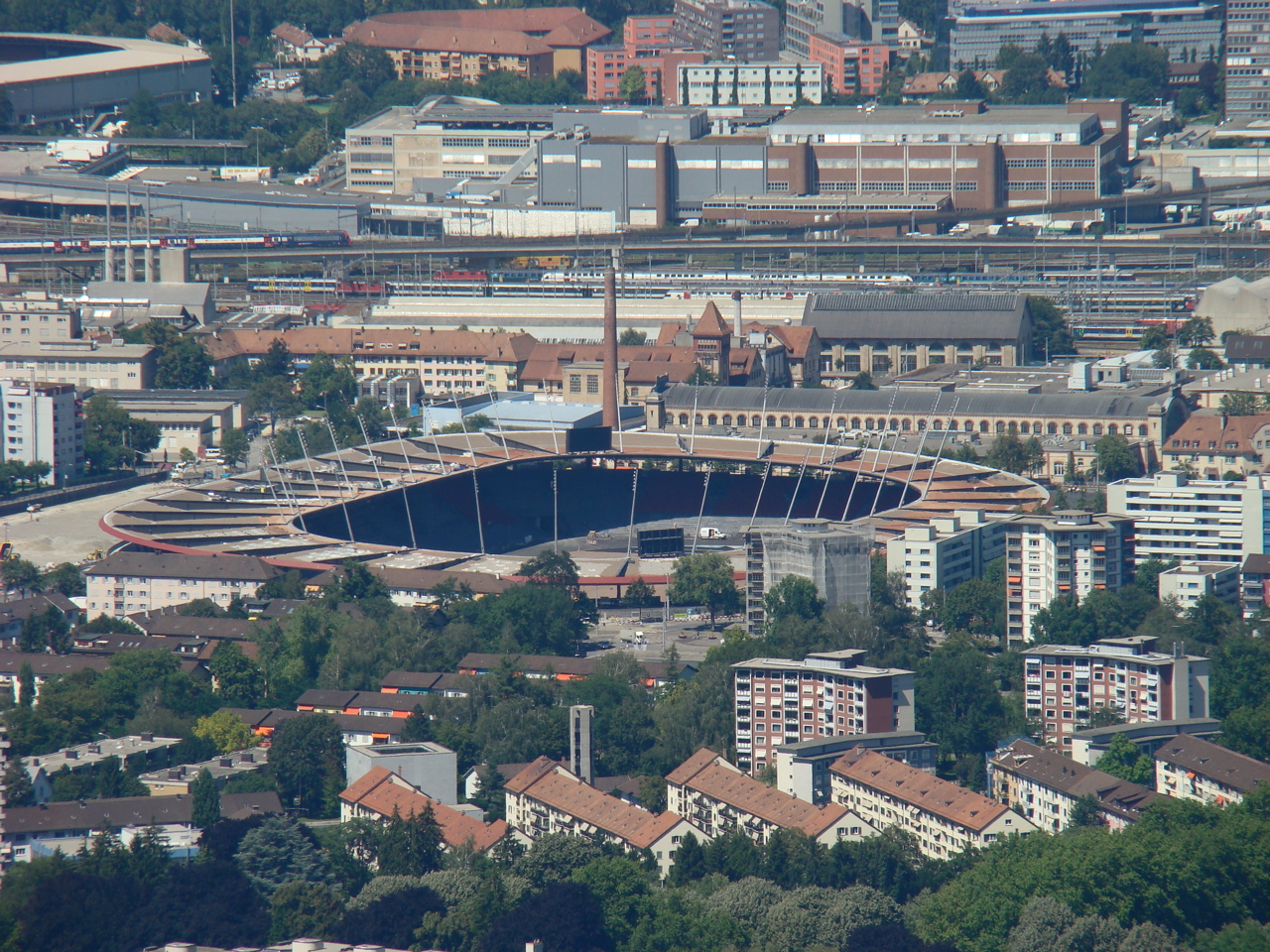 Der neue Letzigrund in der Endphase der Konstruktion, gesehen von der Terrasse des Hotels Uto Kulm auf dem Üetliberg